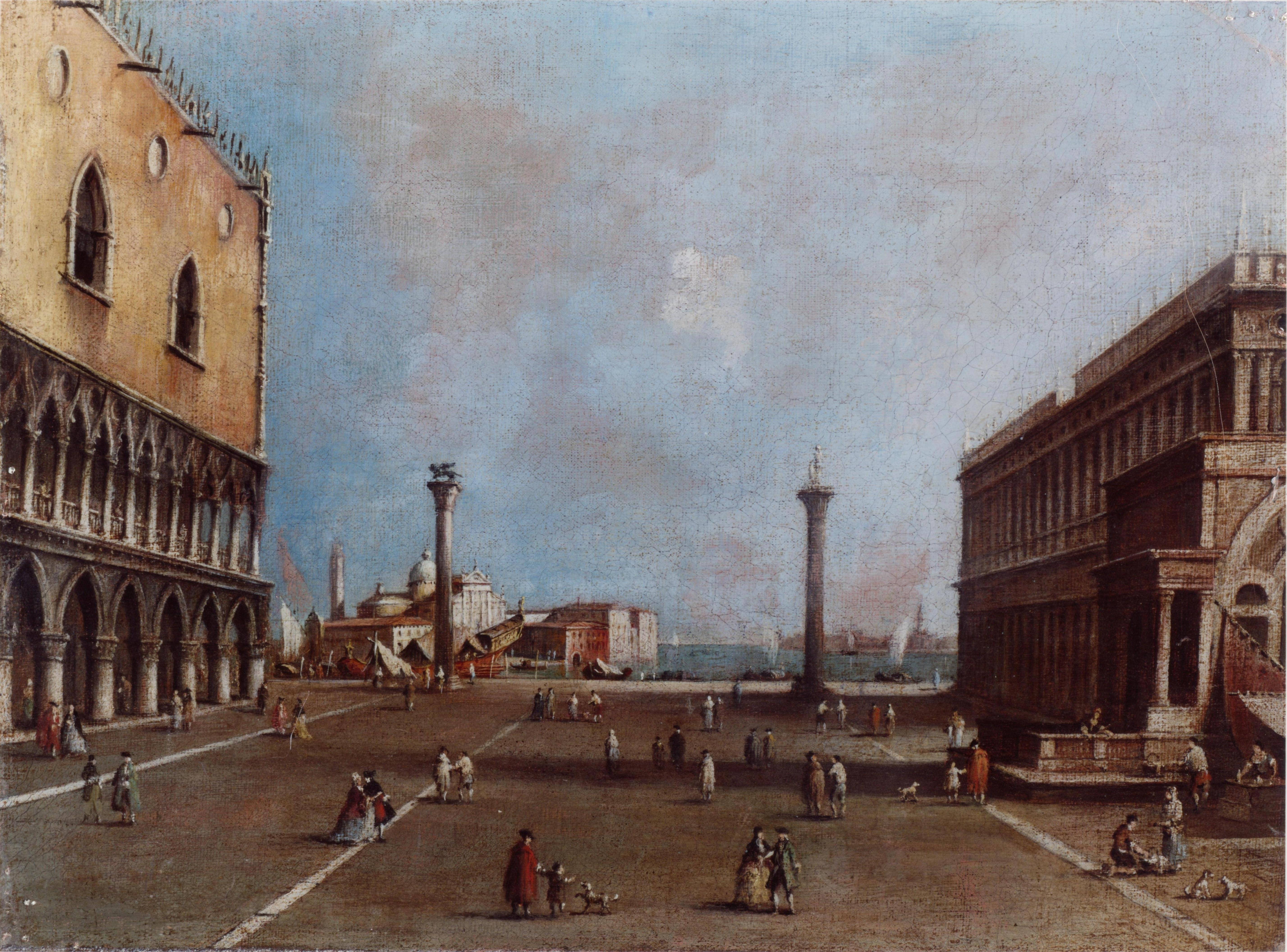 La Piazzetta Verso L' Isola San Giorgio